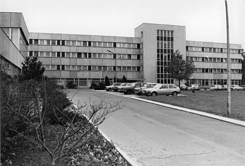 Berlin, Klninikum Buch ADN-ZB Link 12.2.90-rü-Berlin: Blick auf das ehemalige Regierungskrankenhaus in Berlin-Buch. Jetzt werden in den verschiedenen Spezialabteilungen dieser medizinischen Einrichtung Diplomaten und in erforderlichen Fällen Patienten aus allen Bezirken der DDR behandelt und betreut.